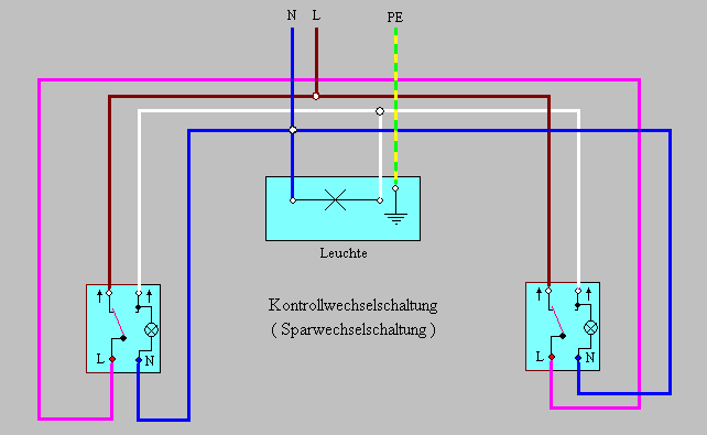 Kontrollwechselschaltung